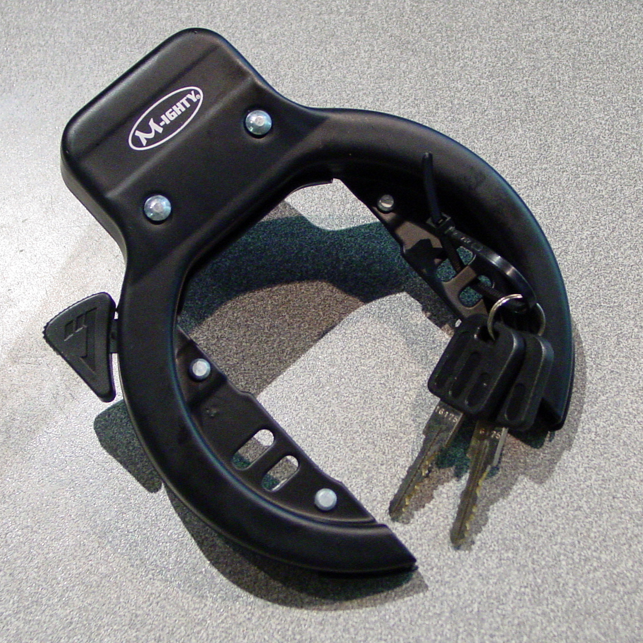 Fahrradtechnik